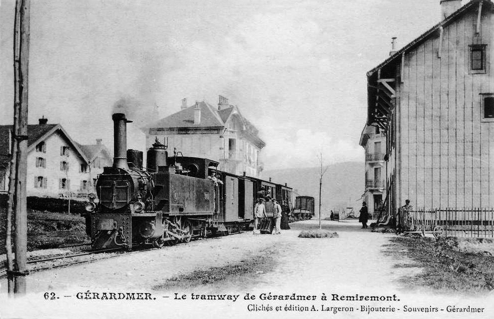 Le tramway de Gérardmer à Remiremont, station de Gérardmer au début des années 1900.